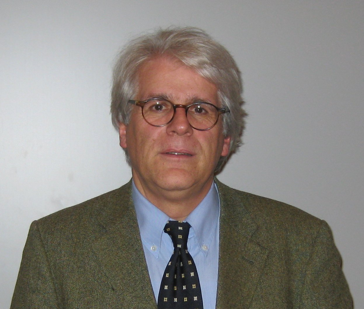 Prof. Heinz-Josef Bontrup